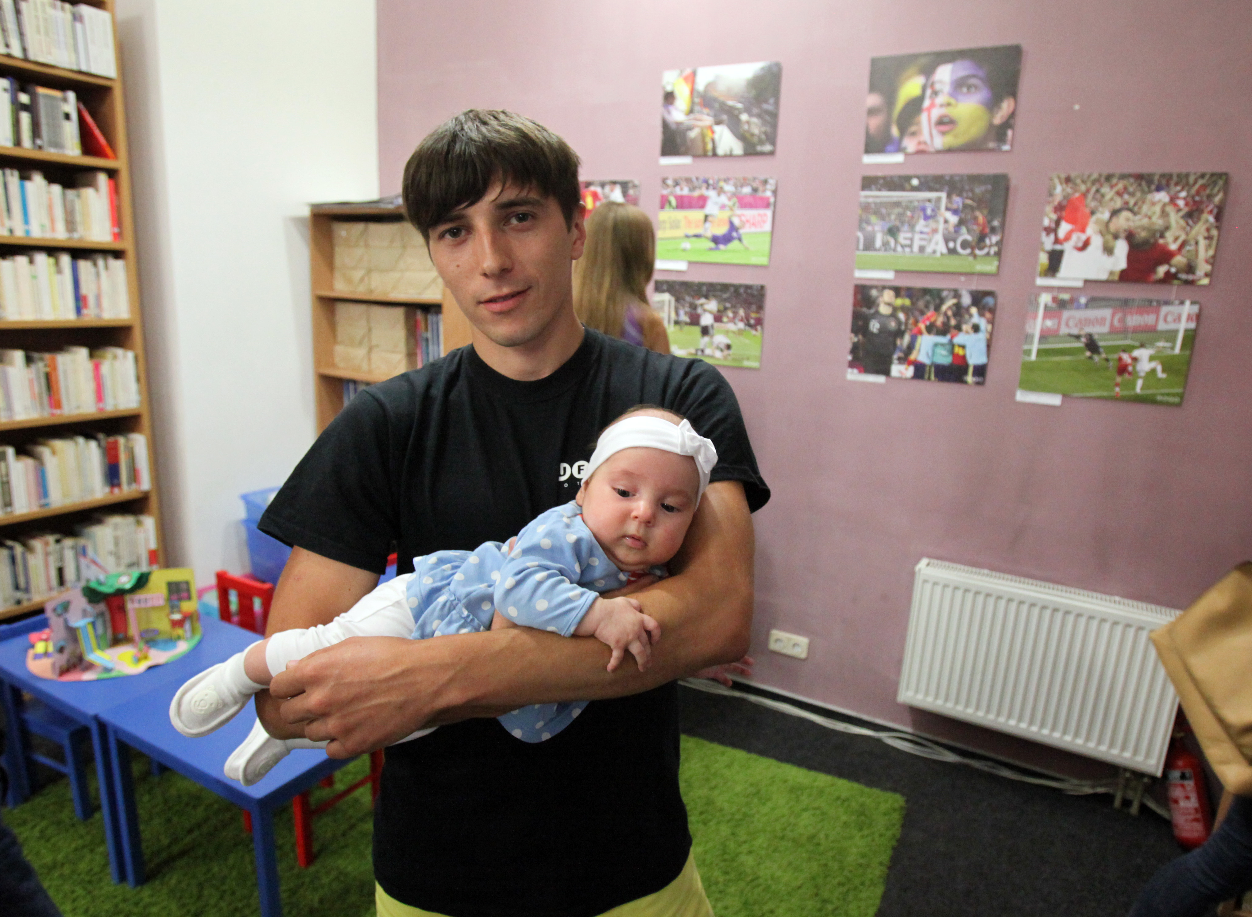 Український фотограф, пластун, військовик Віктор Гурняк з донькою Юстиною на відкритті фотовиставки «ЄВРО-2012 крізь призму LUFA» у м. Львові, 2 серпня 2012 р.